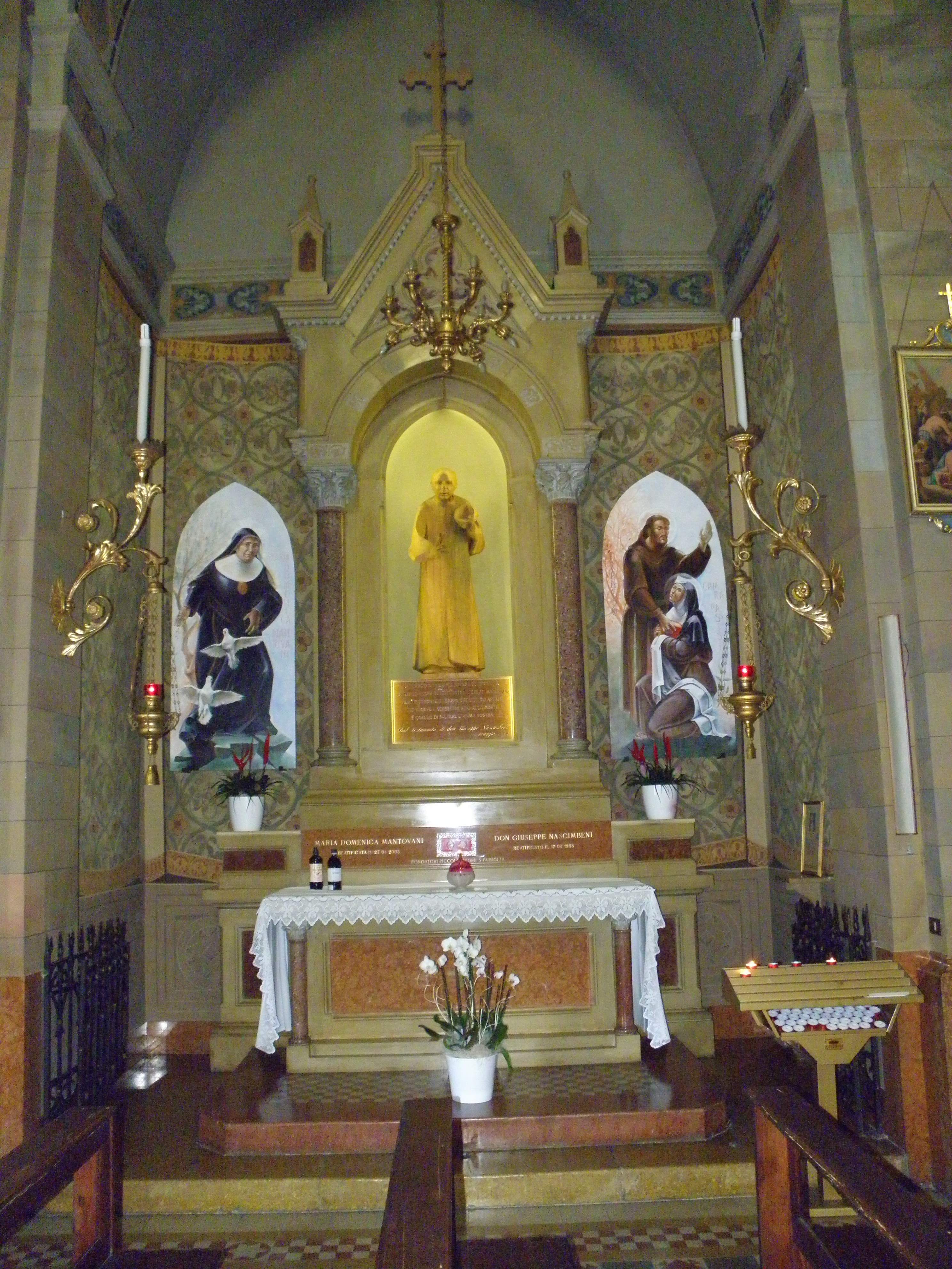 Castelletto di Brenzone, frazione del comune sparso di Brenzone sul Garda: chiesa parrocchiale di San Carlo Borromeo, interno, l'altare, il primo a sinistra, dedicato ai beati Maria Domenica Mantovani e Don Giuseppe Nascimbeni.